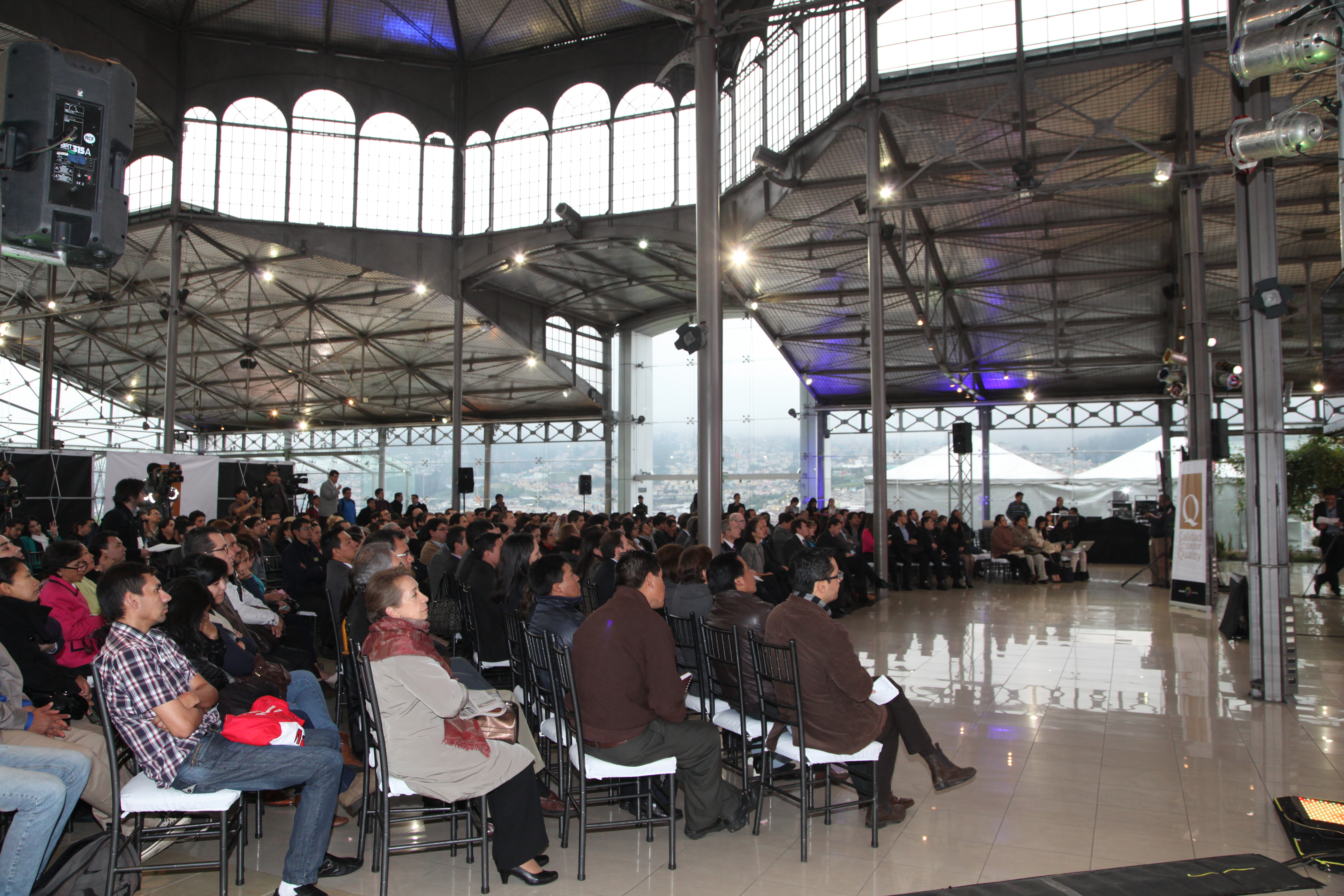 LANZAMIENTO AÑO DE LA CALIDAD - ITCHIMBÍA022